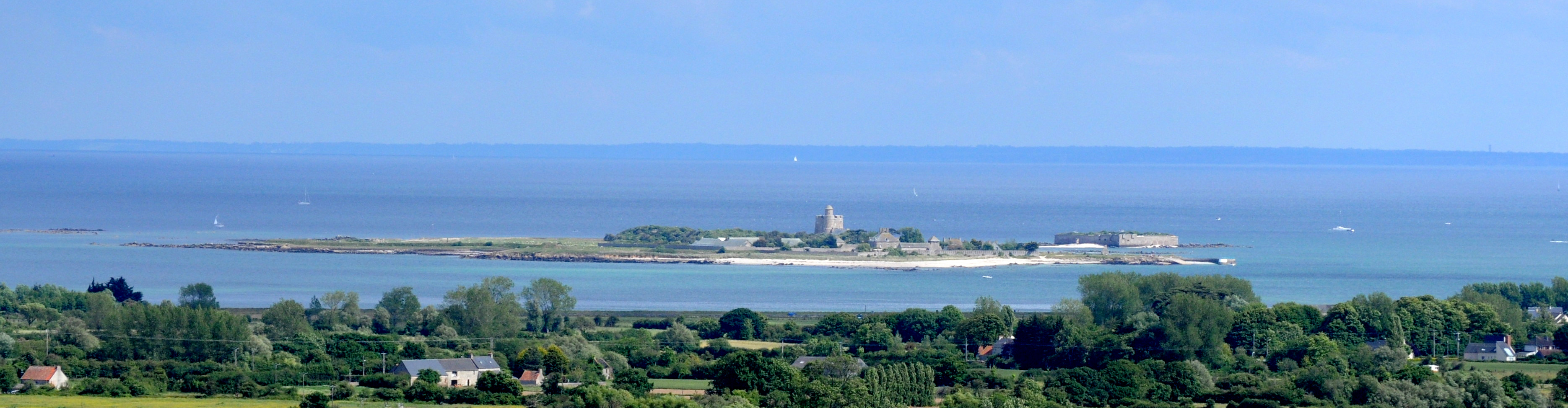 Île de Tatihou (Saint-Vaast-la-Hougue/Manche) vue de la pernelle